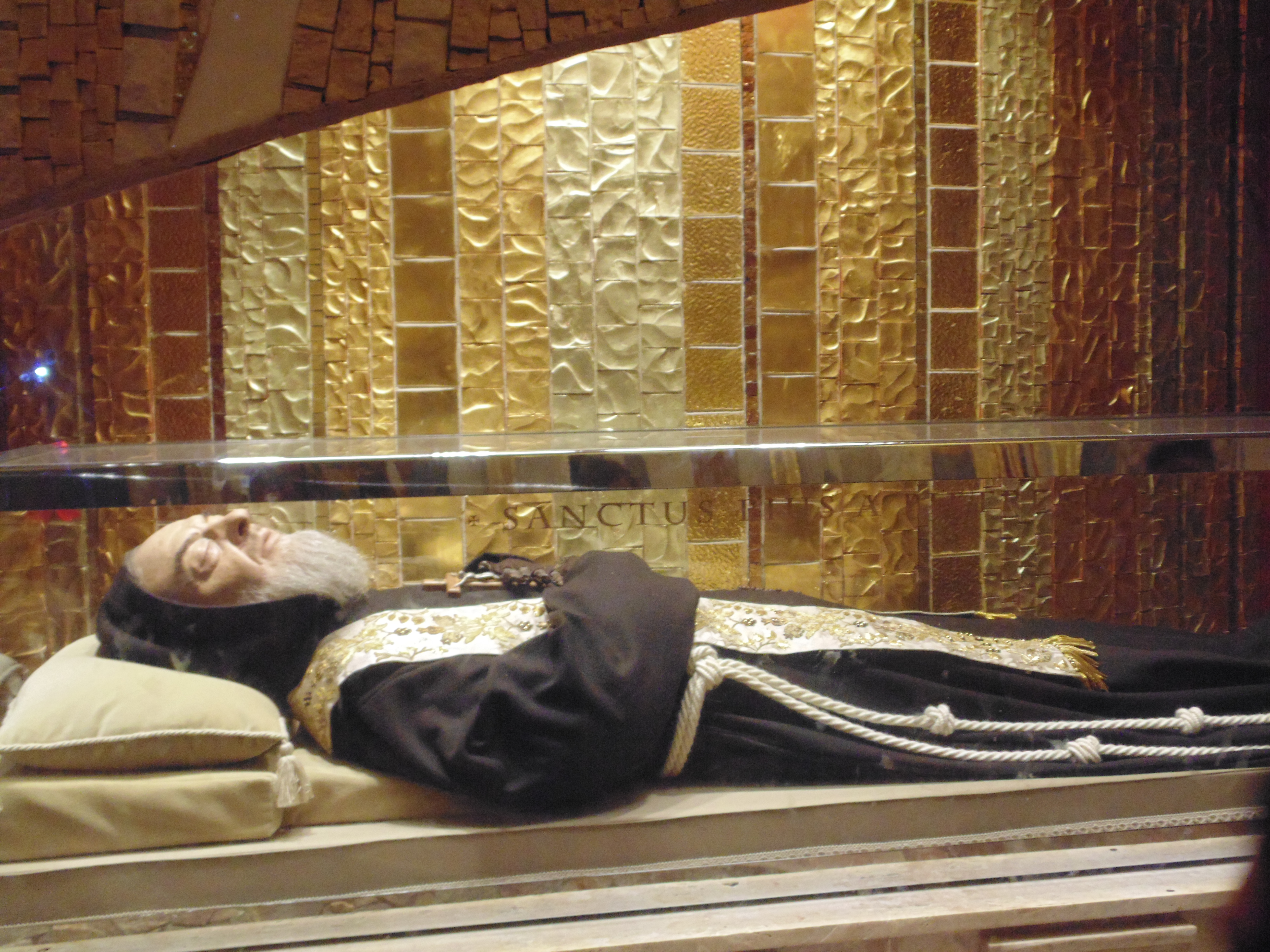 71013 San Giovanni Rotondo, Province of Foggia, Italy